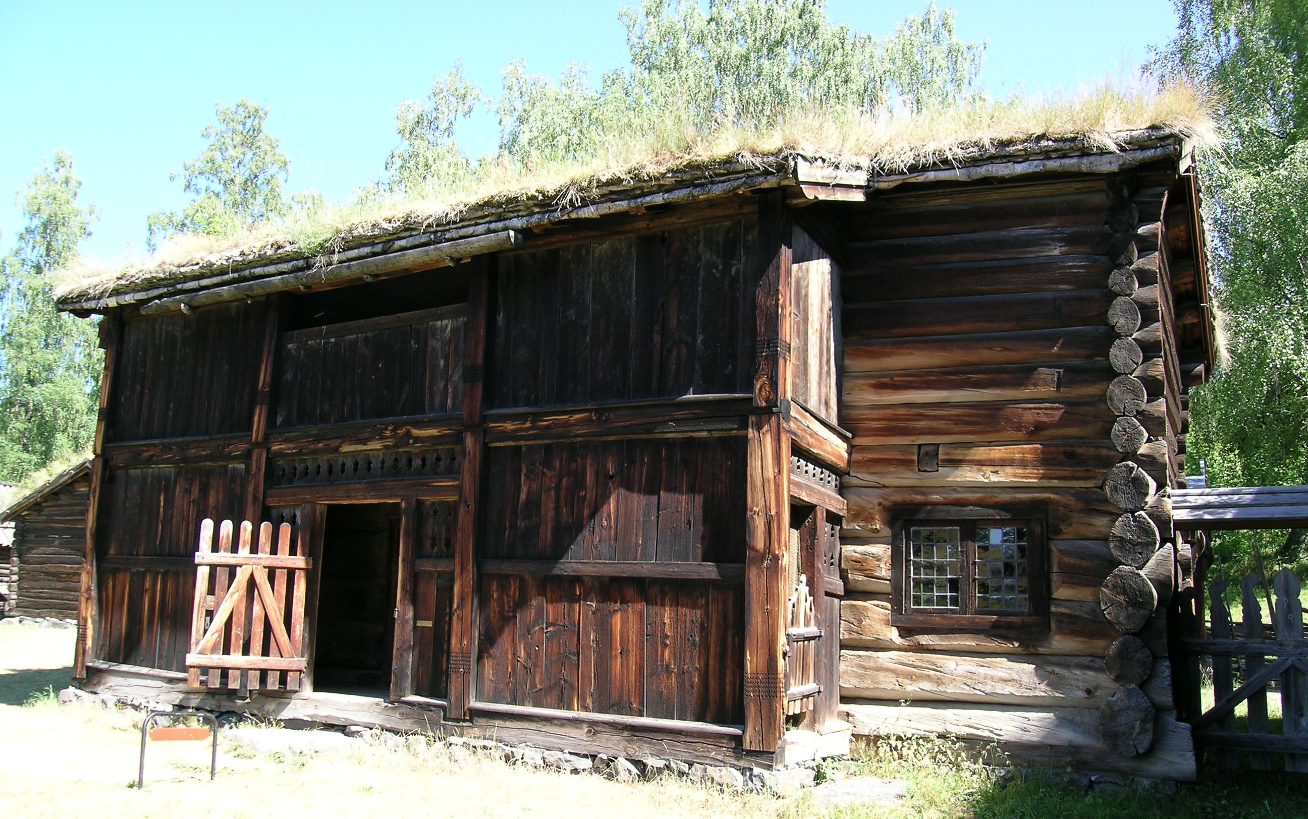 Eldhus from Gudbrandsdalen, Norway. A type of farm house where baking, breweing and heavy wash was done. Maihaugen folk museum, Lillehammer.